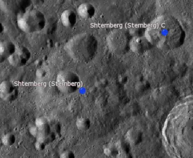 Cráter lunar Shternberg. Cráteres satélite. (Imagen LRO)